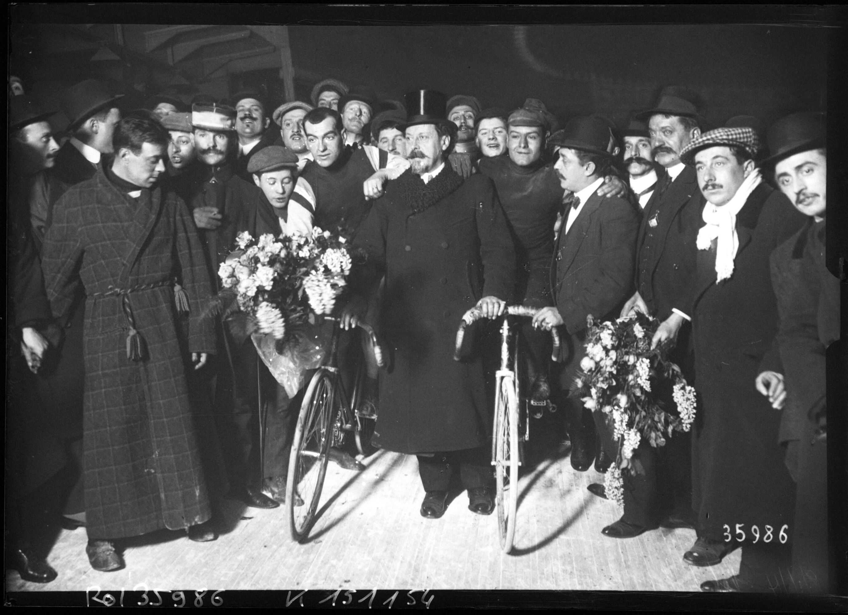 18-1-14, Vel d'hiv, Six jours, équipe Hourlier-Comès victorieuse